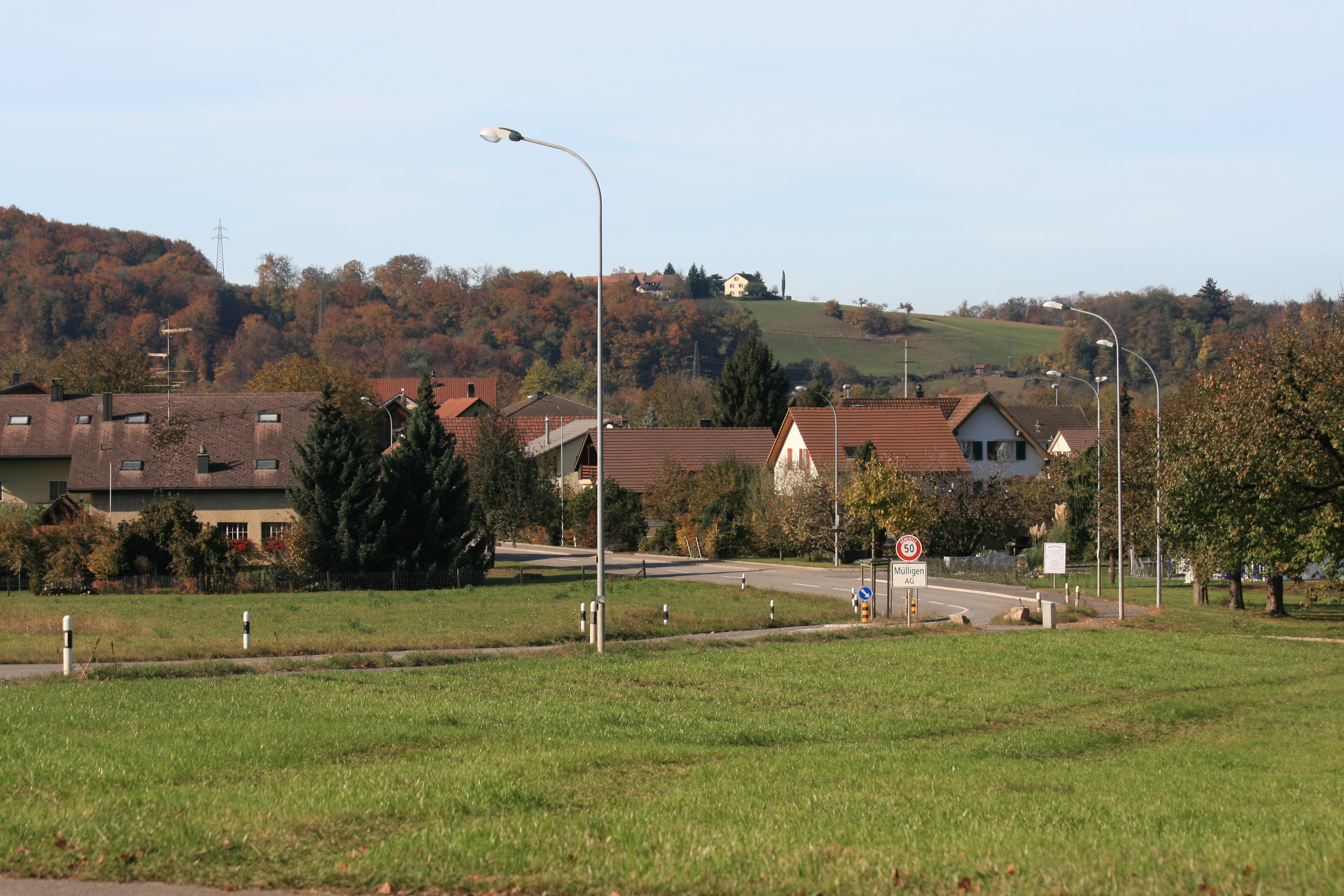 Ortseingang von Mülligen an der Strasse von Birrhard her